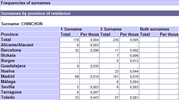 Frecuencia del apellido Chinchón por provincia de residencia. Datos procedentes de la Estadística del Padrón Continuo a fecha 01/01/2013. Por secreto estadístico sólo se muestran los apellidos cuya frecuencia es mayor que 5 en alguno de los dos apellidos para el total nacional. Para las provincias seleccionadas.